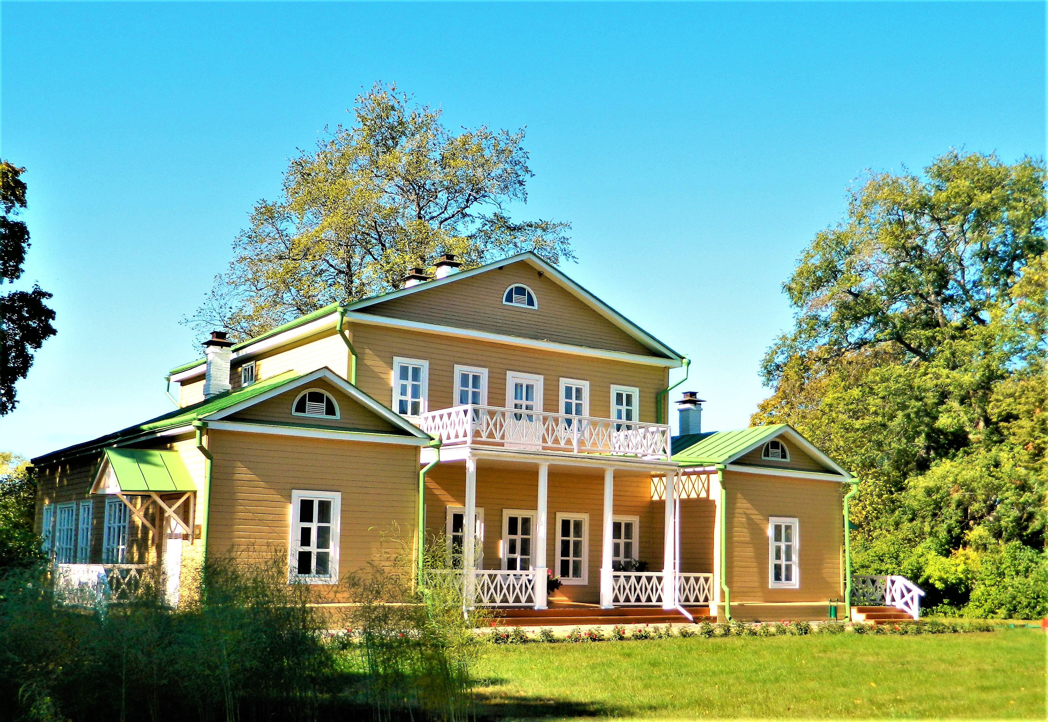 Главный дом (Пензенская область, Белинский, село Лермонтово, Государственный Лермонтовский музей-заповедник "Тарханы")